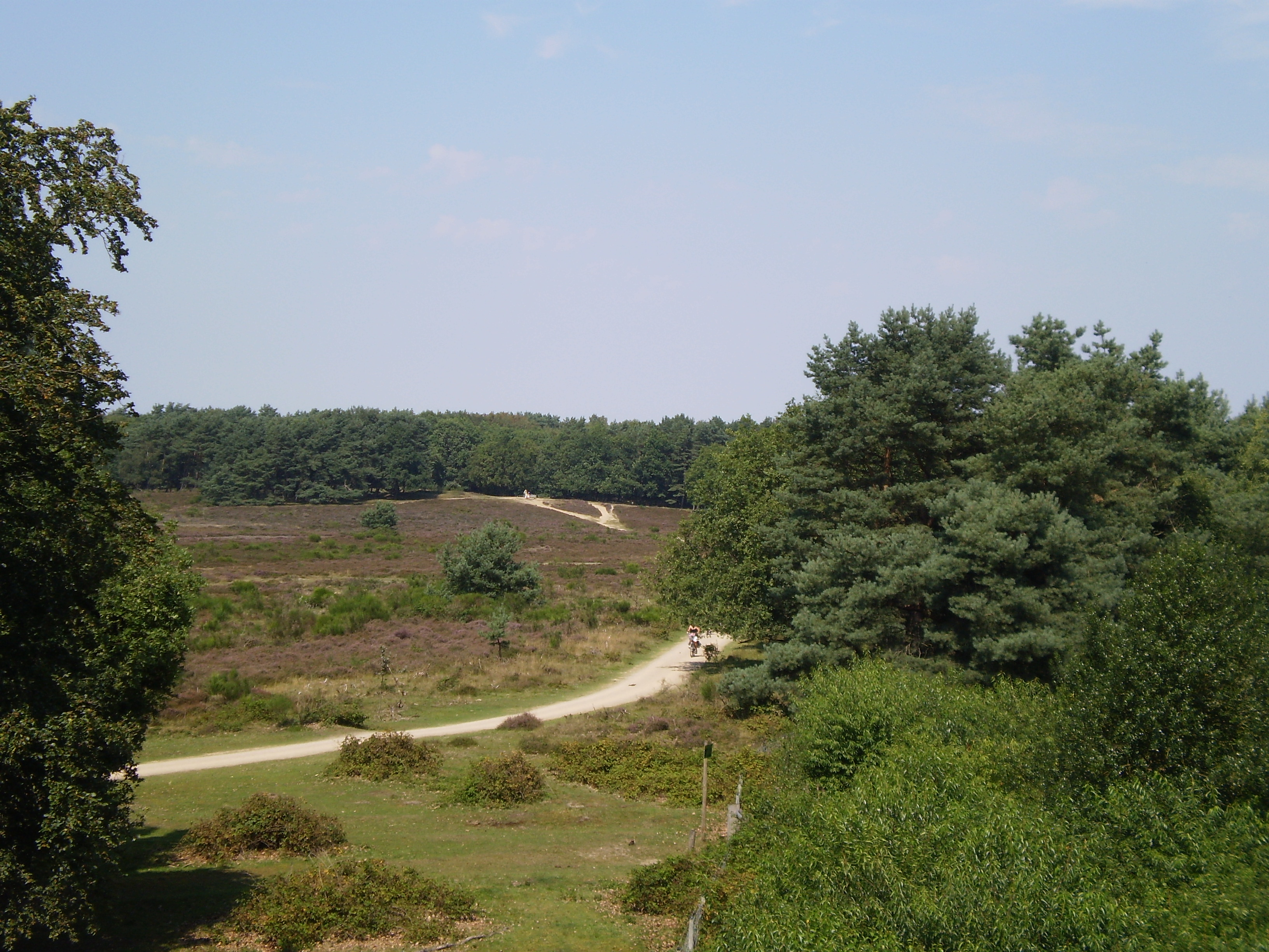 Foto oanbean troch Swarte Kees op 6 augustus 2009